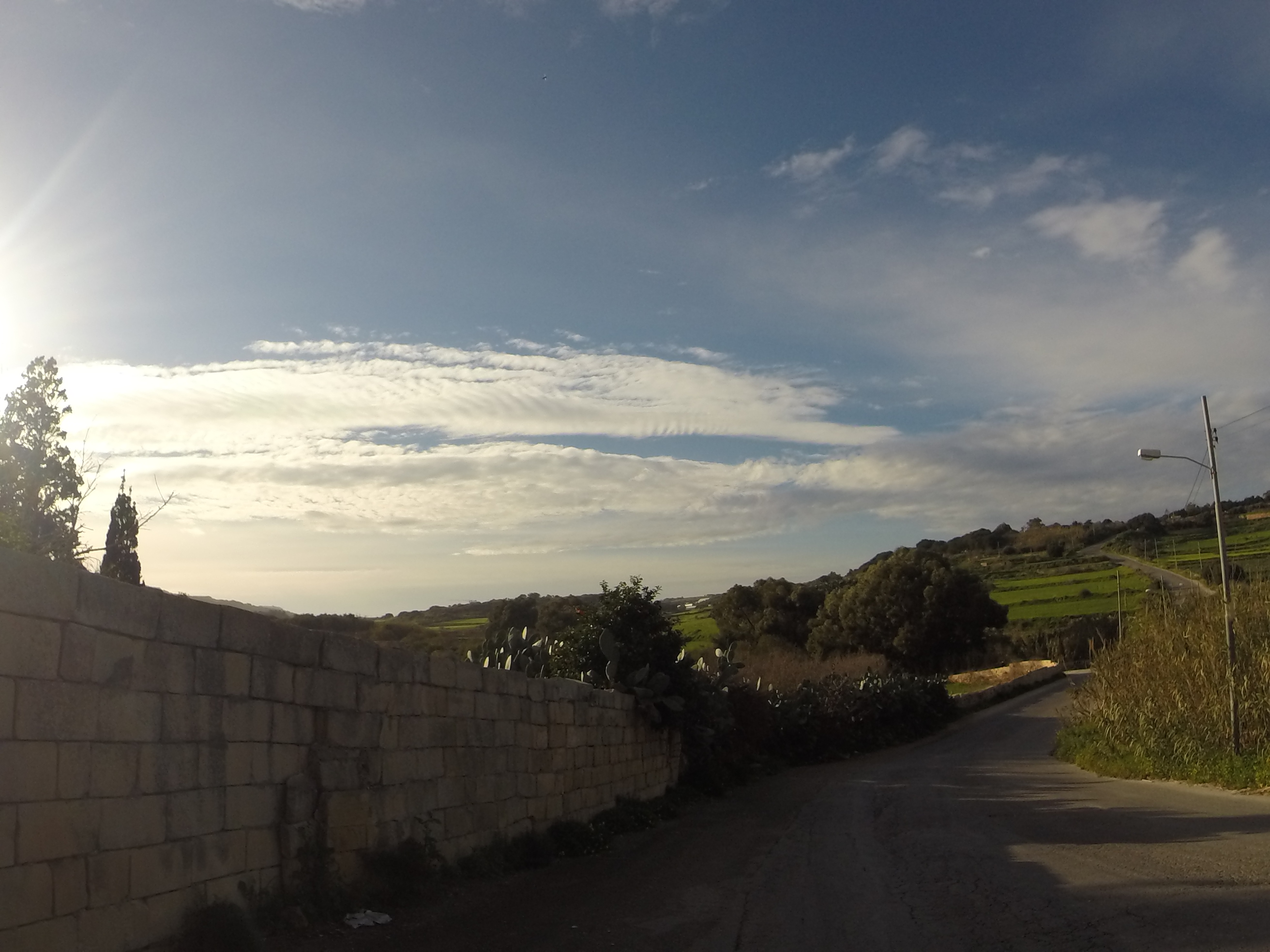 Bidnija, Mosta, Malta